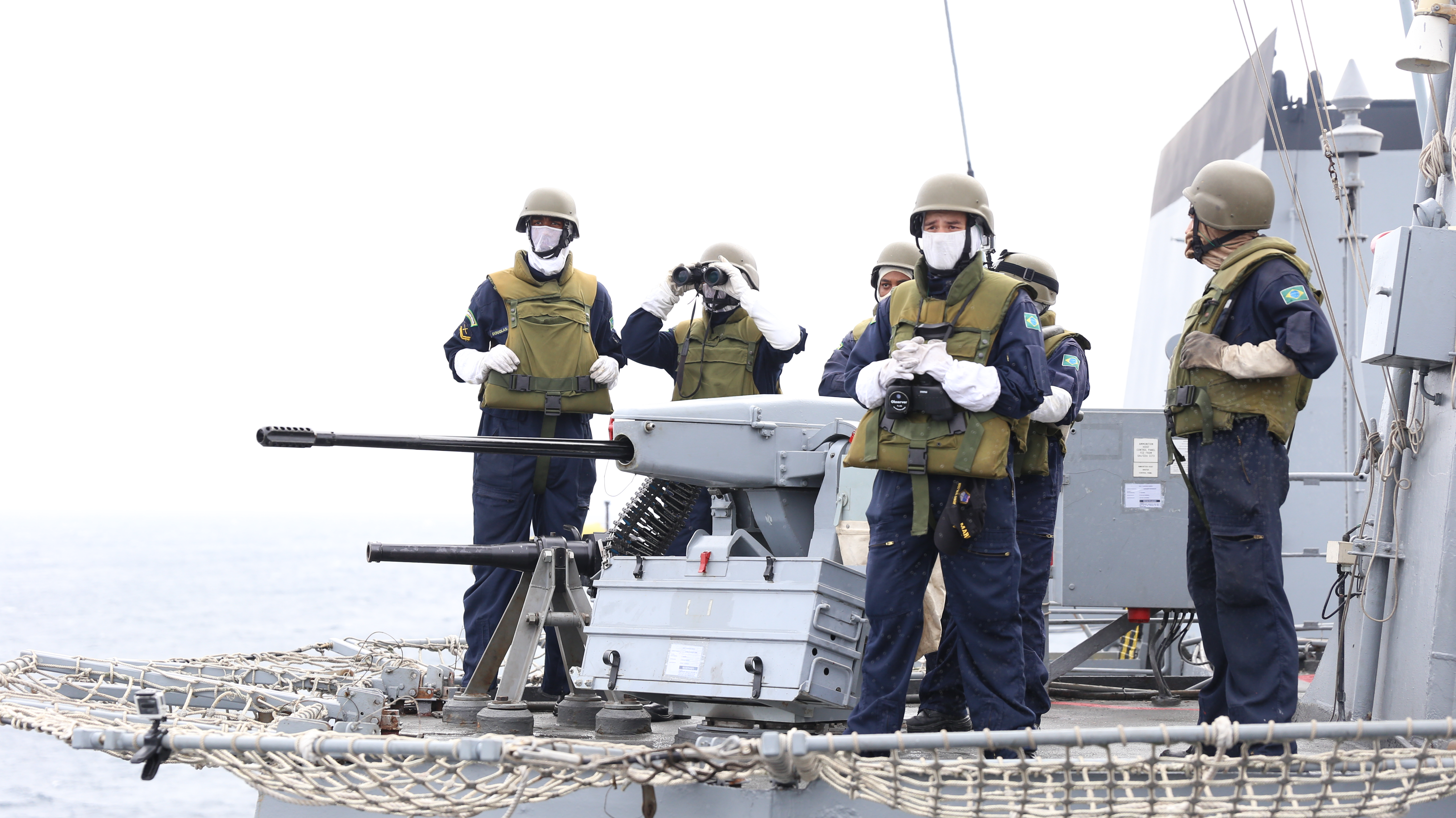 TIRO KILLER TOMATO Arquivo liberado pela Marinha do Brasil através de projeto GLAM com Wiki Educação Brasil